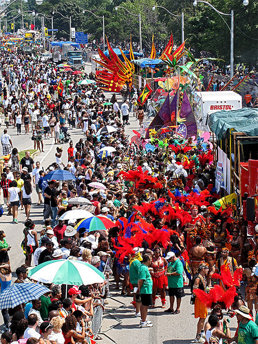 caribana parade 2009